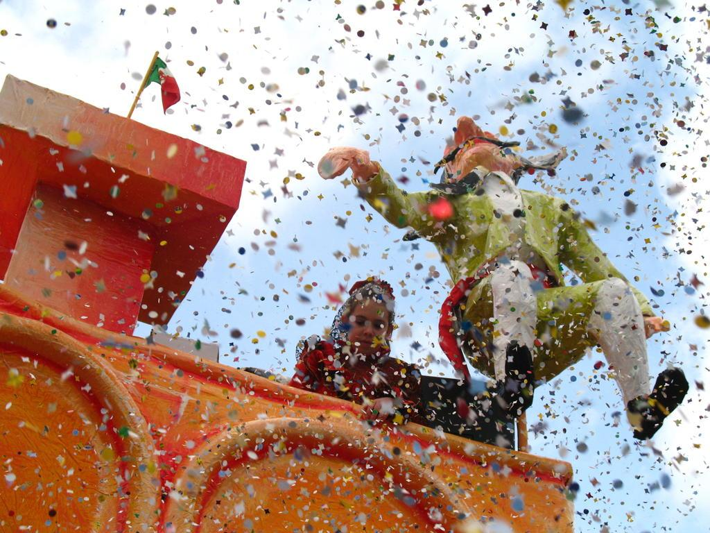 Carnevale a Tempio Pausania